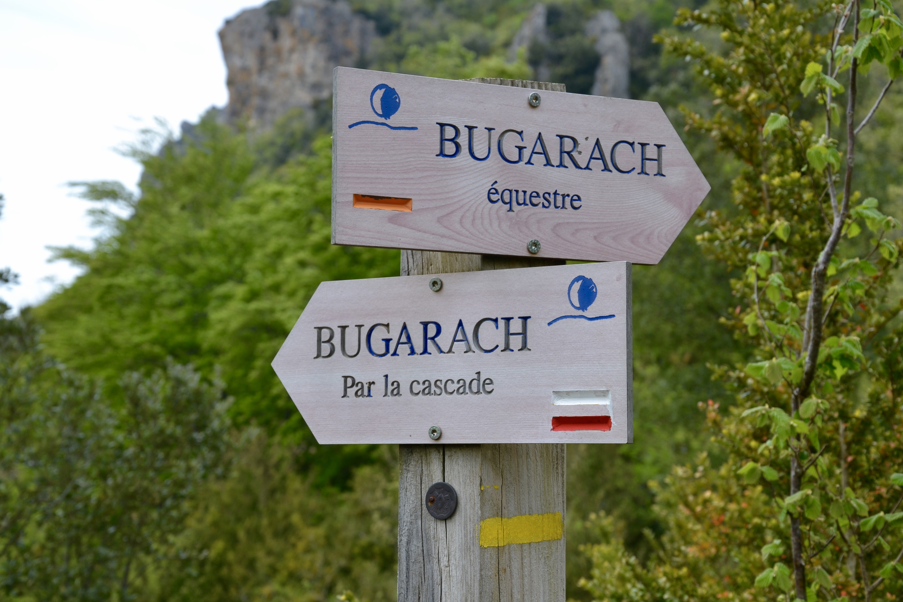 Balisage de randonnées au pied du pech de Bugarach (Aude, France).